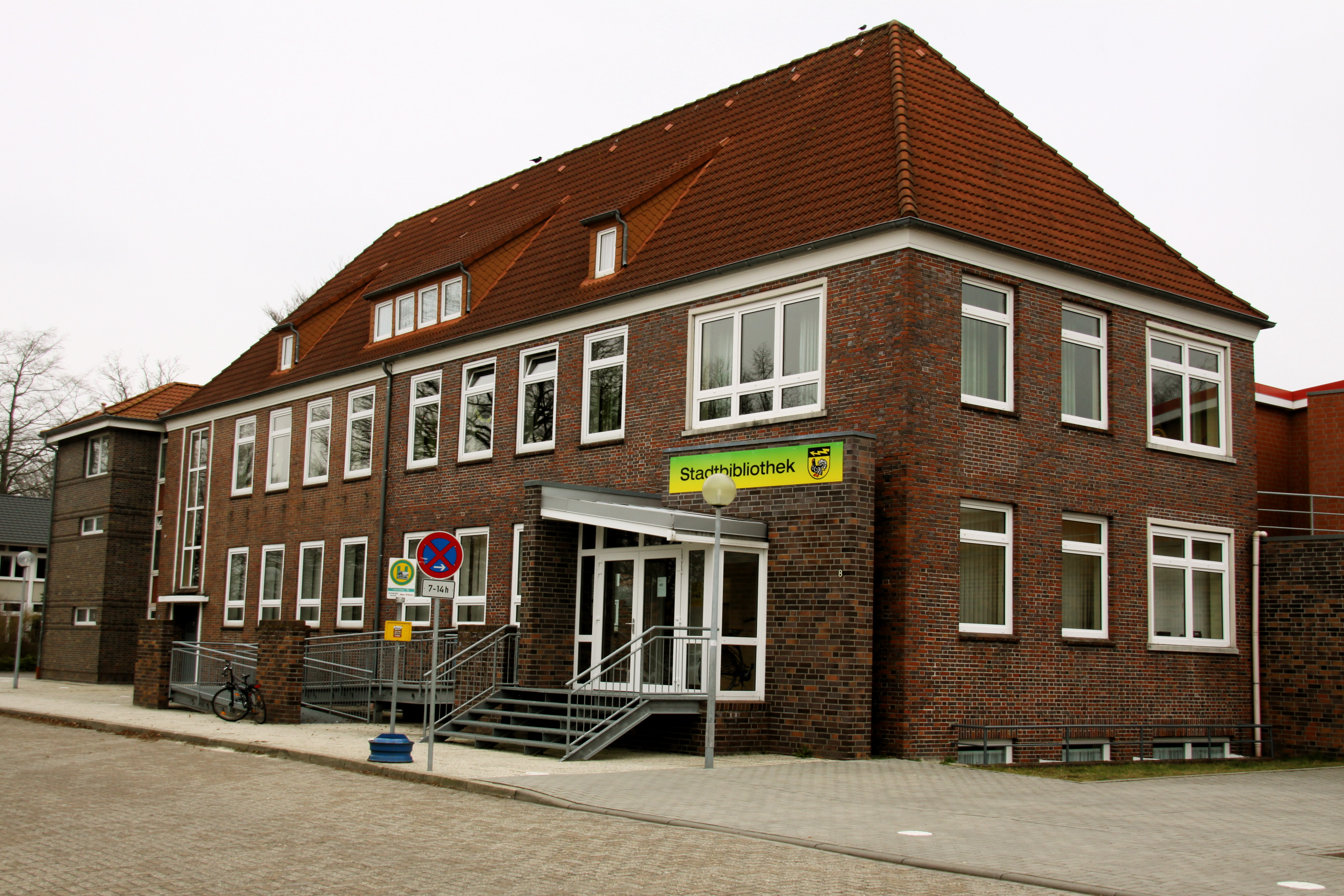 Stadtbibliothek wiesmoor